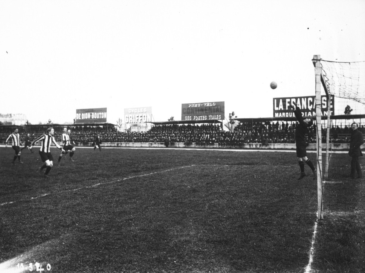 Parc des Princes, 1er mai 1910, US Tourcoing contre SH Marseille, finale du championnat de France de football USFSA.